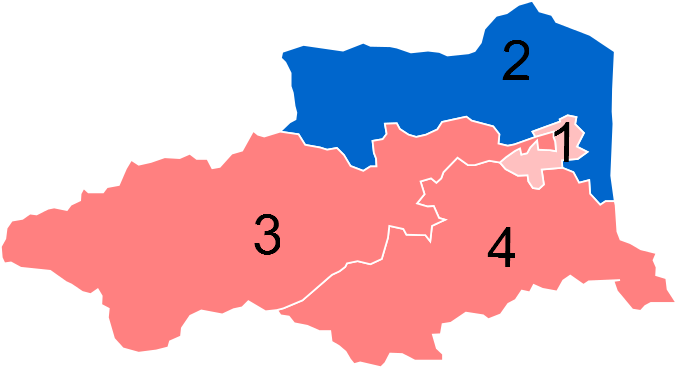 Résultats des élections législatives des Pyrénées-Orientales en 2012